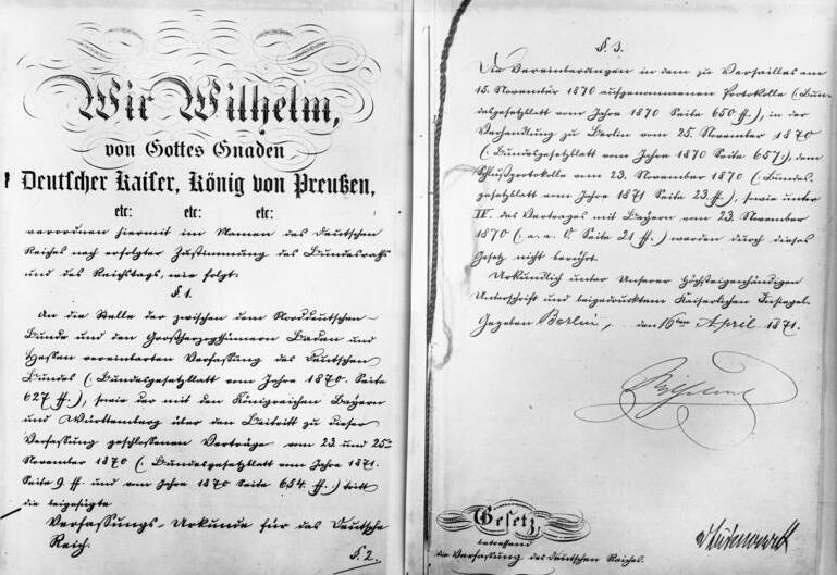 60 Jahre Deutsches Reich! Am 18. Januar werden es 60 Jahre, dass das Deutsche Reich in Versailles proklamiert wurde. Durch die Verfassung vom 16. April 1871 wurde die Proklamation des Deutschen Reiches rechtskräftig und die Regierungsgewalt über die Vereinigten deutschen Bundesstaaten vom deutschen Reichstag ausgeübt. Die erste und letzte Seite der Reichsgründungs-Verfassung vom 16. April 1871 mit der eigenhändigen Unterschrift des damaligen deutschen Kaisers Wilhelm I.